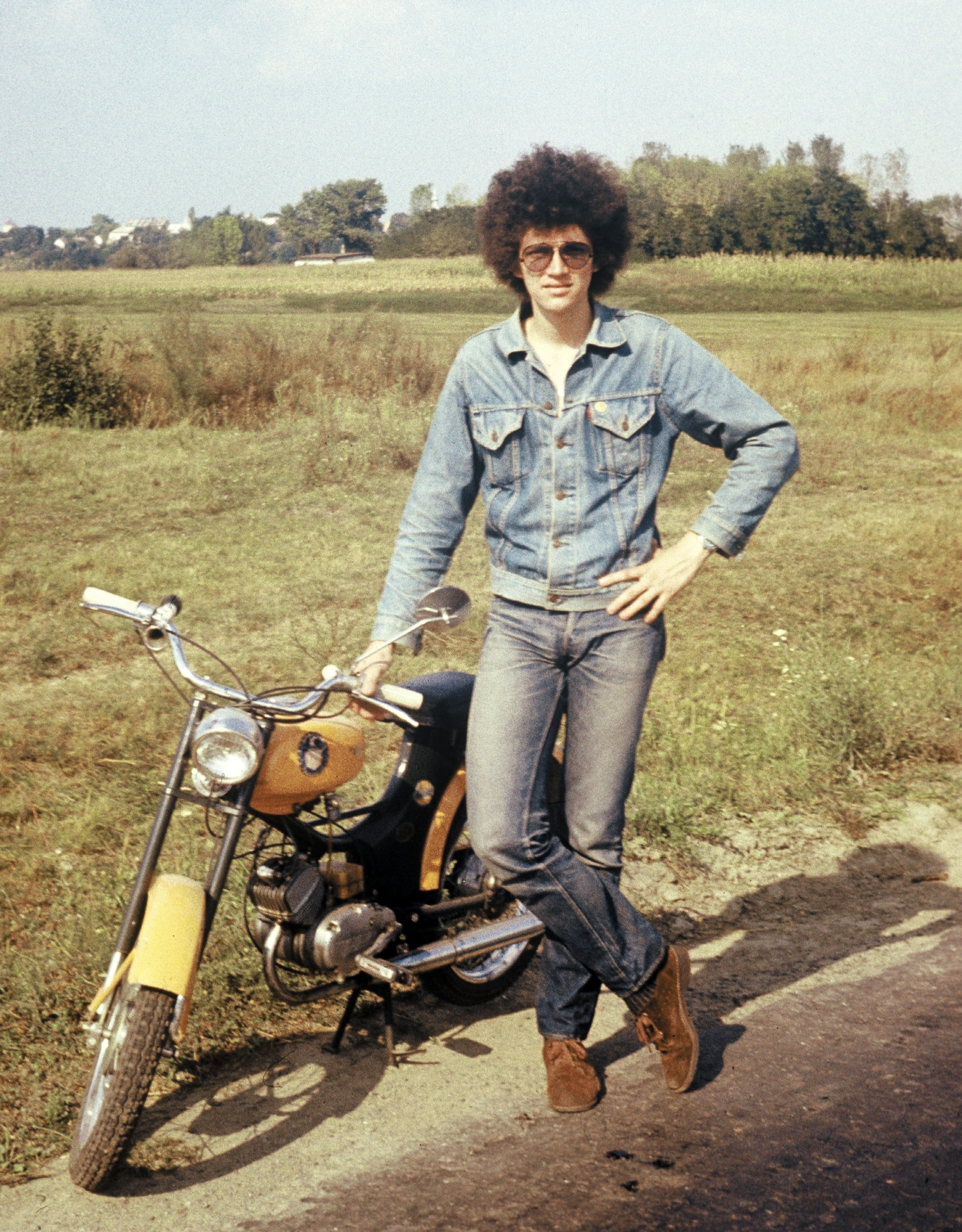 Riga-12 moped. Location: Hungary, Dombóvár Tags: transport, colorful, scooter, motorcycle Title: Riga-12 moped.